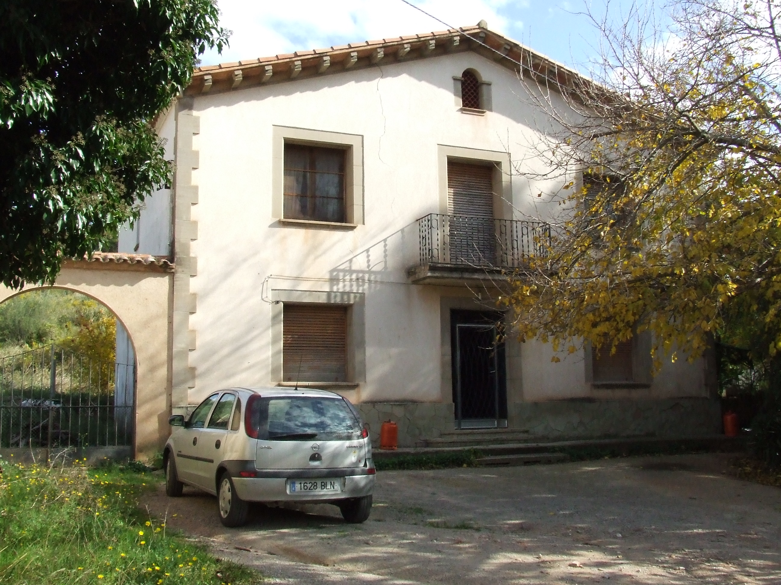 Can Castanyer (Riells del Fai, Bigues i Riells, Vallès Oriental)